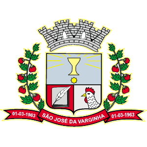 Brasão de Armas do município de São José da Varginha, Minas Gerais, Brasil.